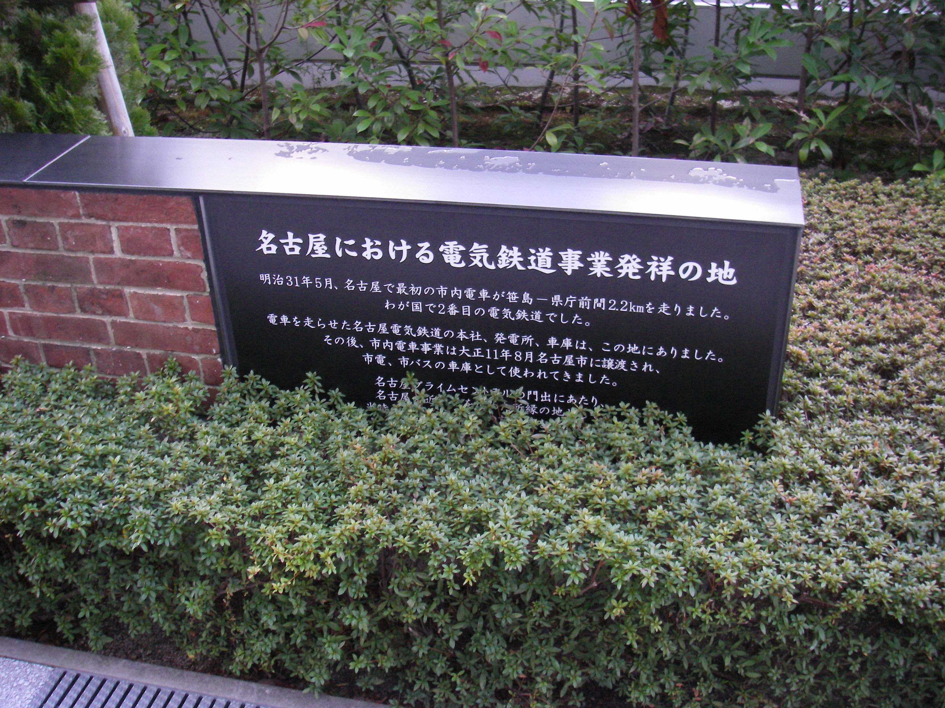 名古屋プライムセントラルタワー 敷地北側にある「名古屋における電気鉄道発祥の地」の碑